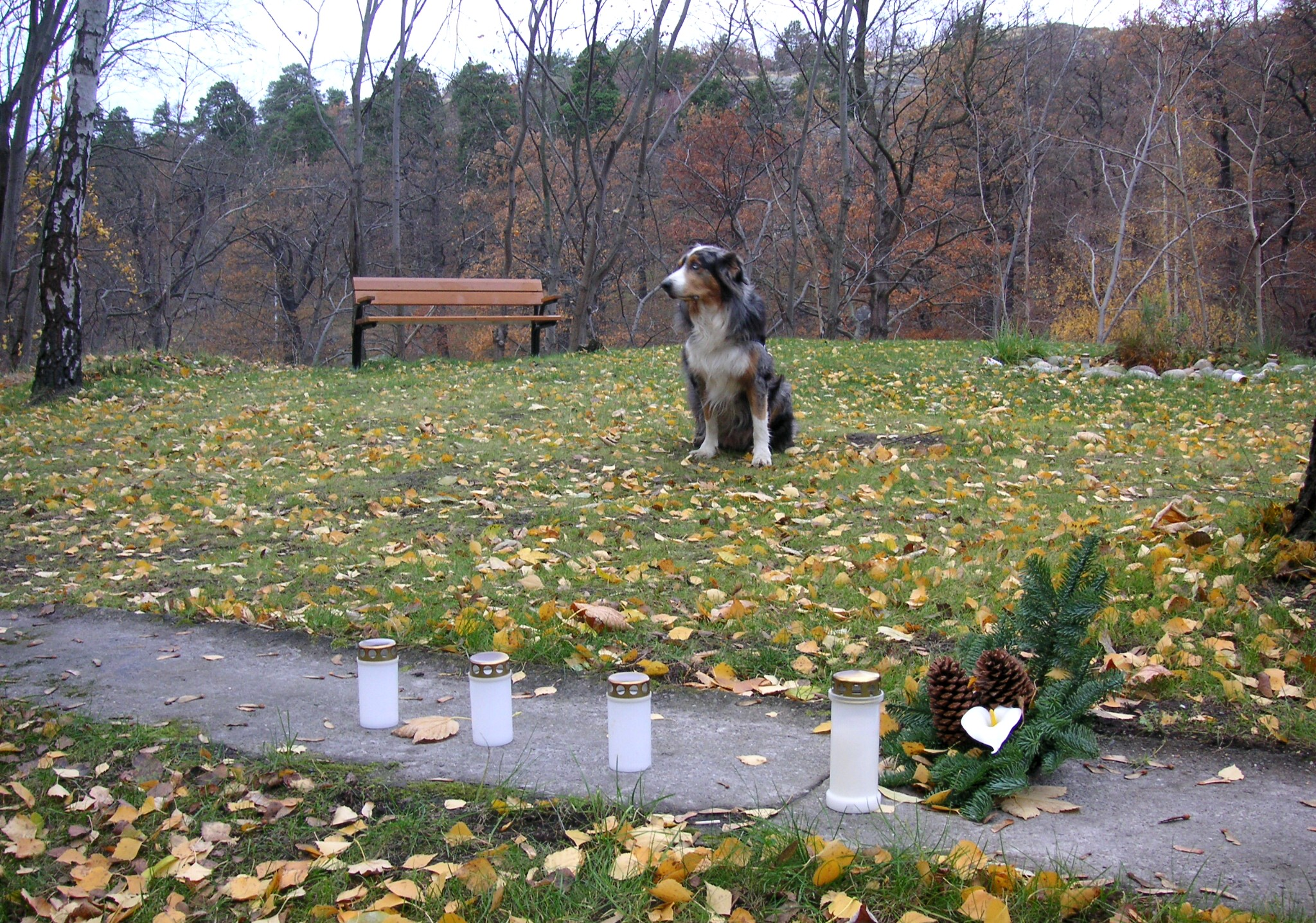 Djurminneslunden vid Vinterviken i Stockholm